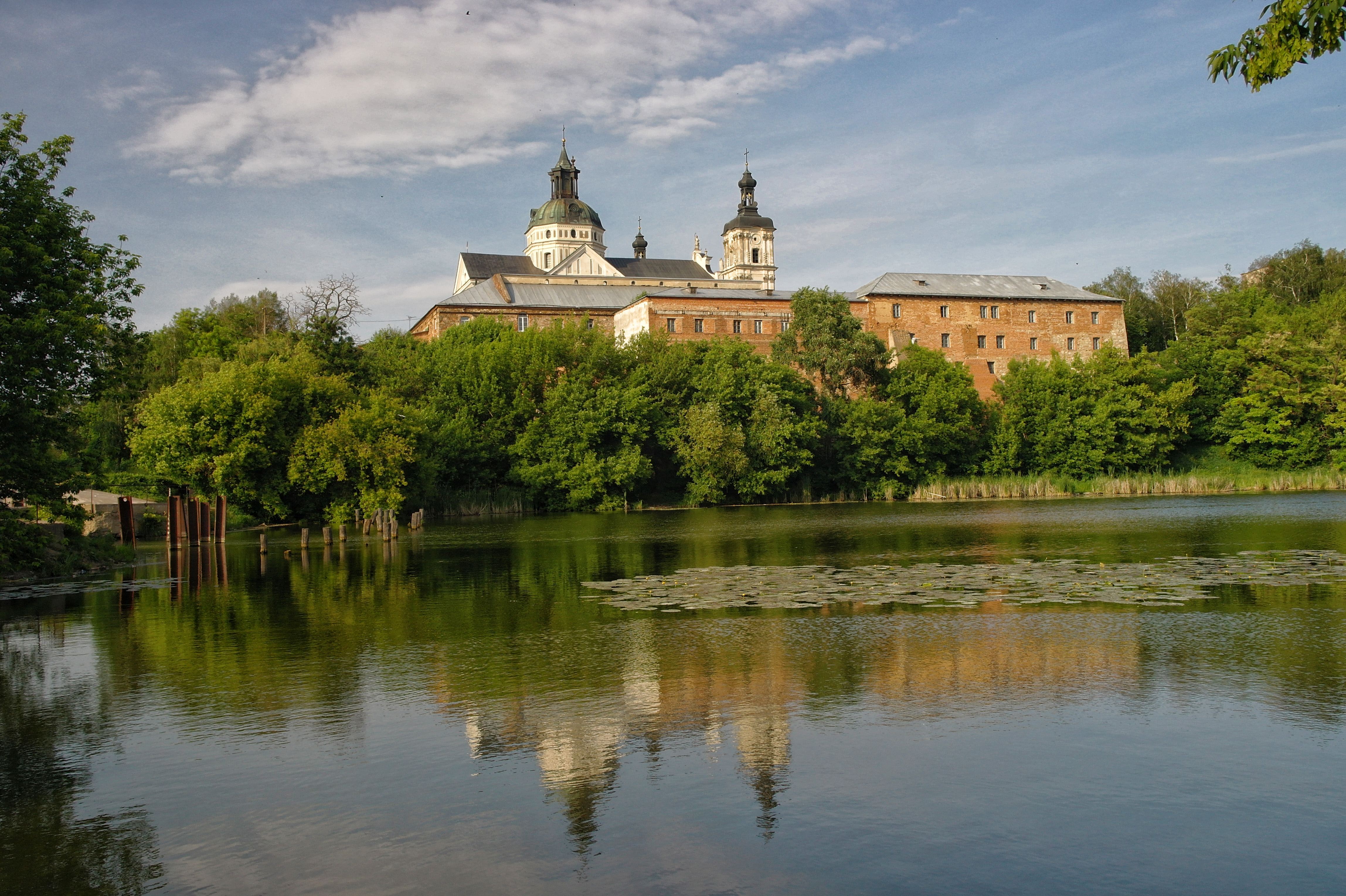 Бердичів. Кармелітський кляштор